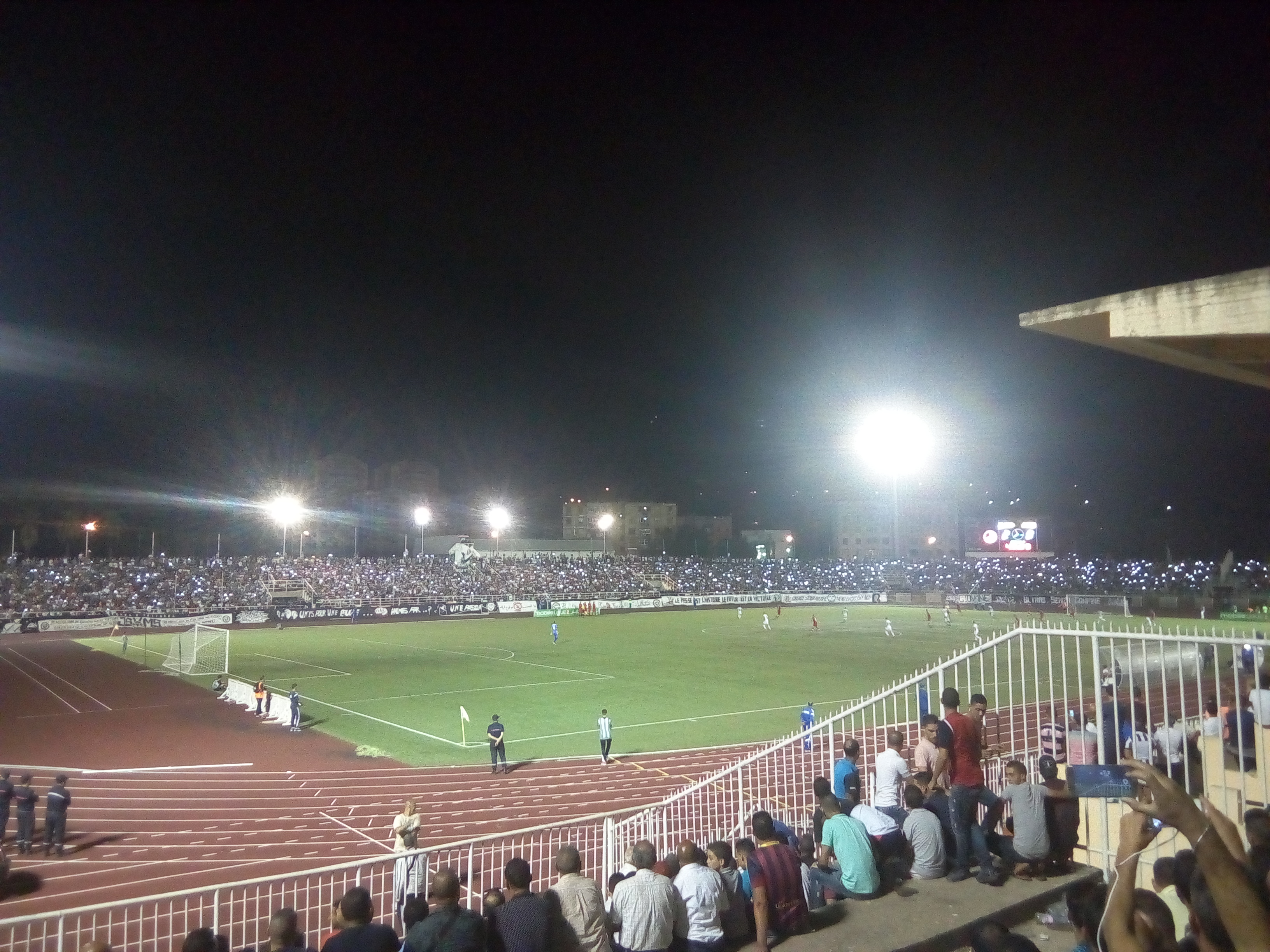 Le stade de 20 août 1955 de Skikda en nuit